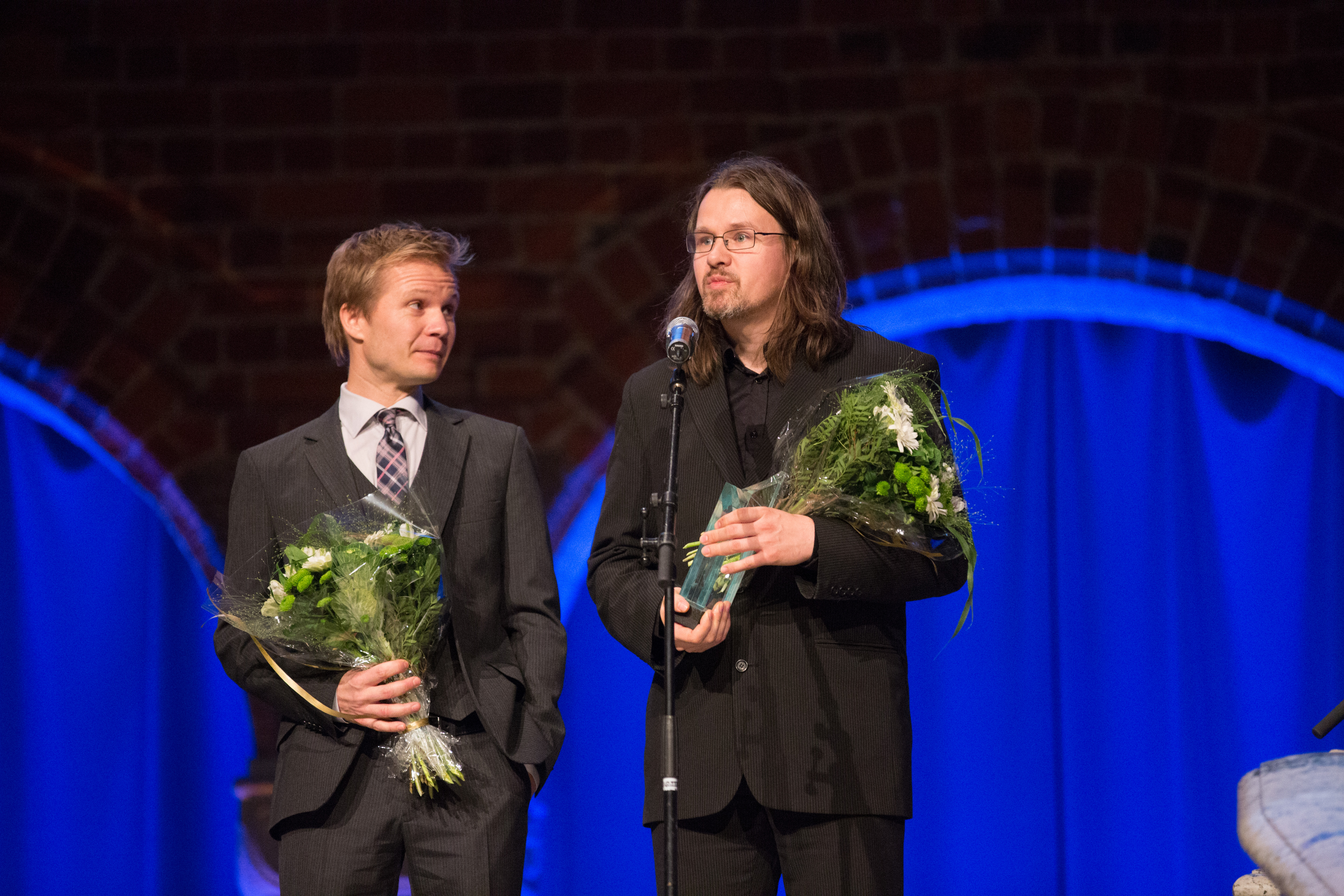 Håkon Øvreås og Øyvind Torseter, vinnere av Nordisk råds barne- og ungdomslitteraturpris 2014 Foto: Magnus Fröderberg/norden.org